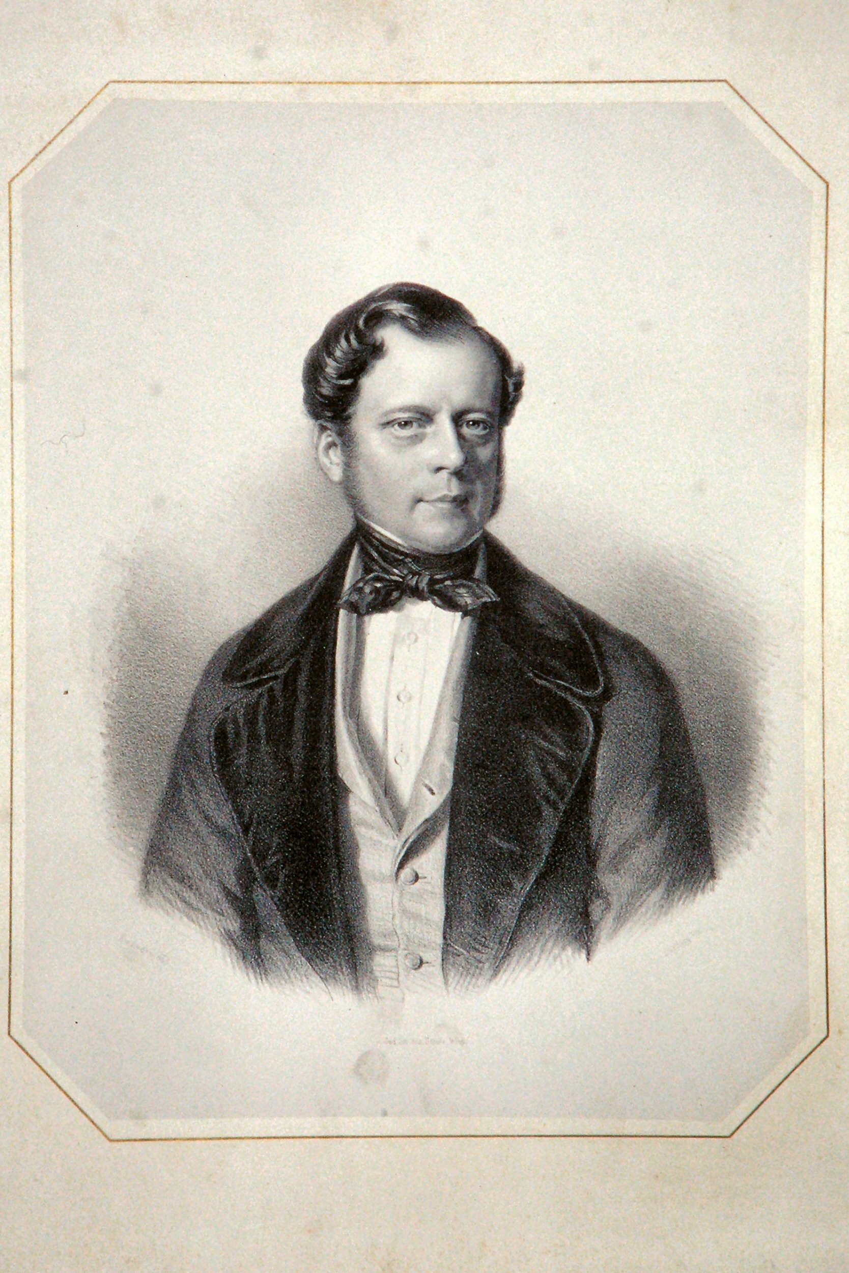 Ferdinand Joachim von Trauttmansdorff (1803-1859) Fürst. Lithographie von Adolf Dauthage, 1845